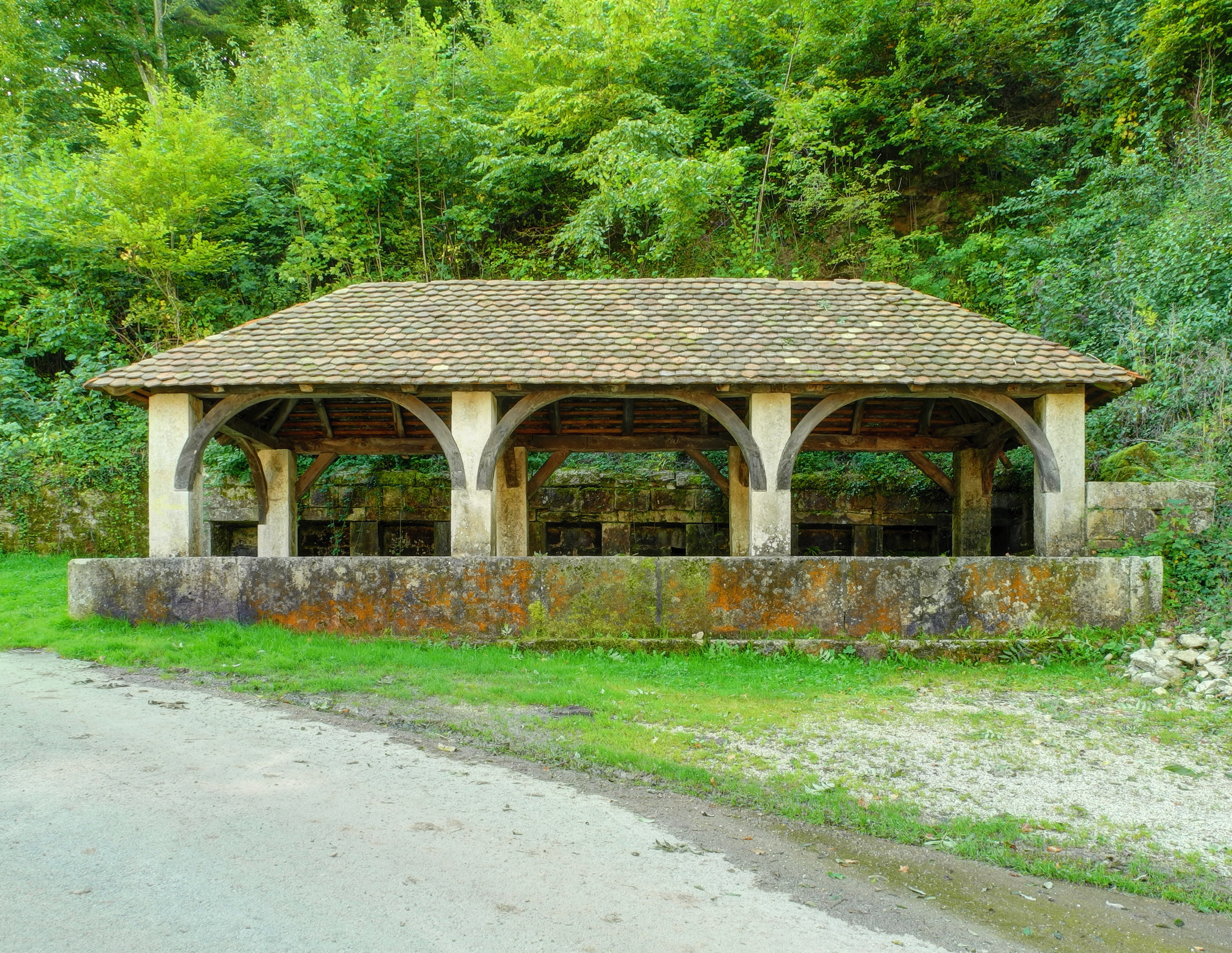 Fontaine-lavoir et abreuvoir de Saint-Dizier-l'Évêque : vue de face (HDR). Édifice inscrit comme Monument Historique sous le n°PA90000009.